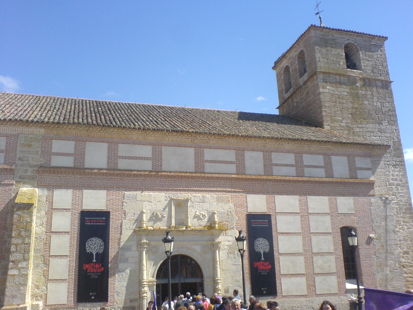 Antigua iglesia de Santa María de Villalar de los Comuneros, actualmente casa de cultura.